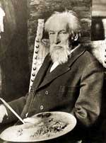 БОТКИН Михаил Петрович (1839-1914) - русский художник, гравер, академик исторической живописи и выдающийся коллекционер.